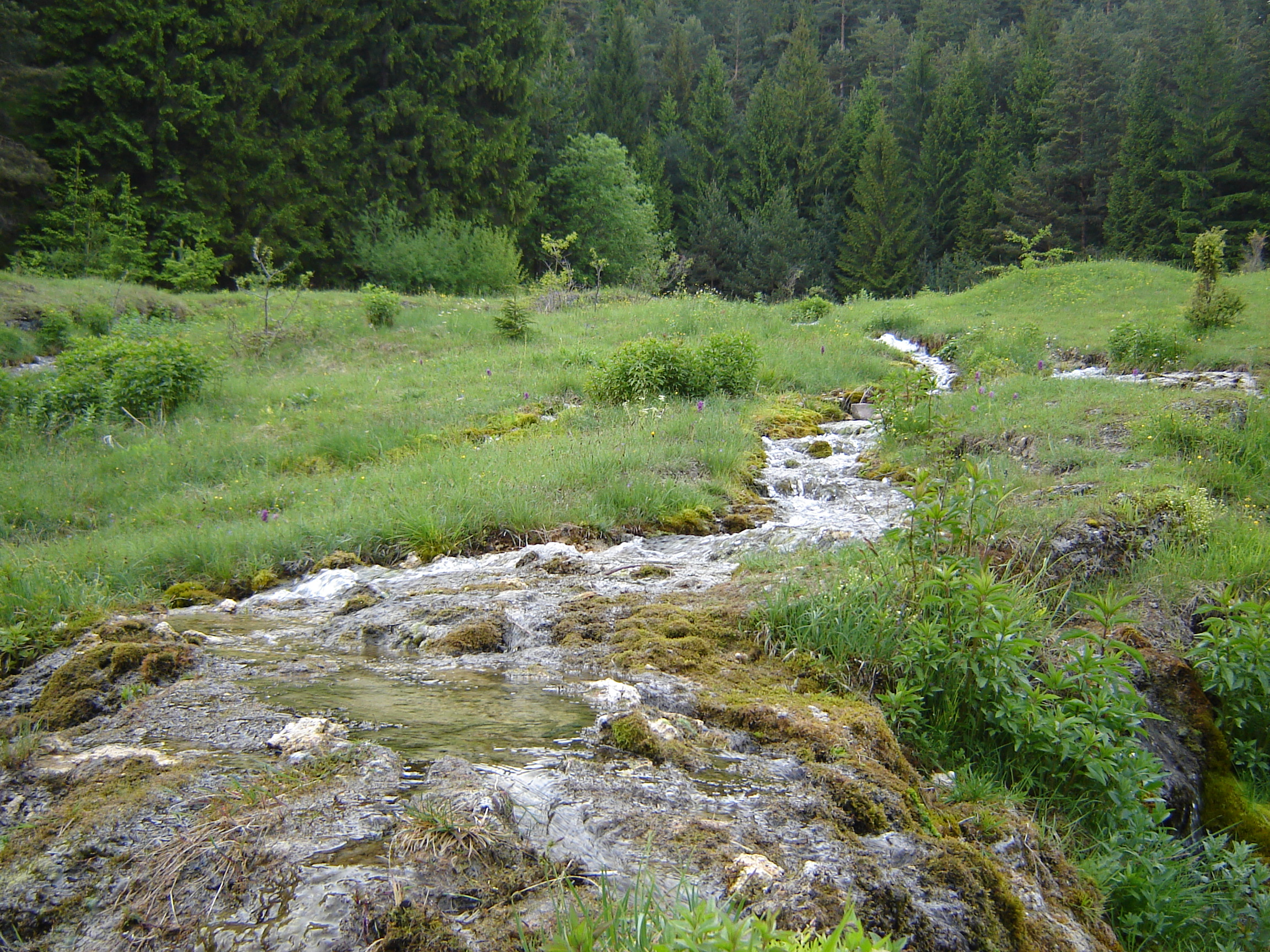 Jazierce - typická vegetácia a podložie